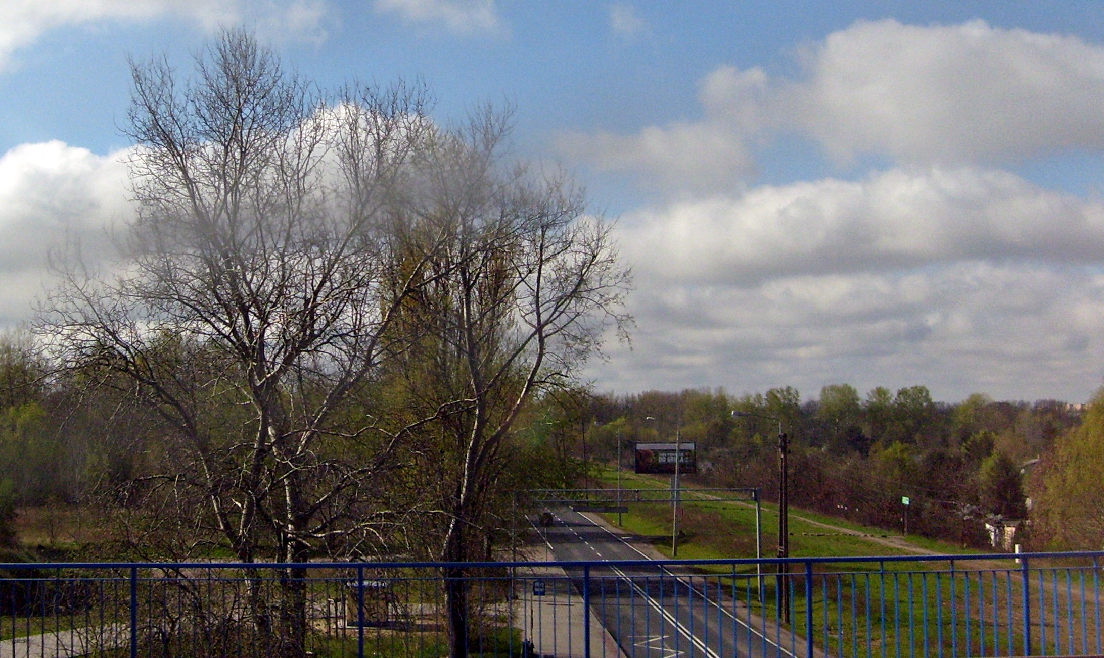 Droga Dębińska, wiadukt Hetmańska